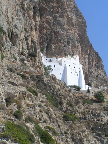 Vakantiefoto zonder copyright.